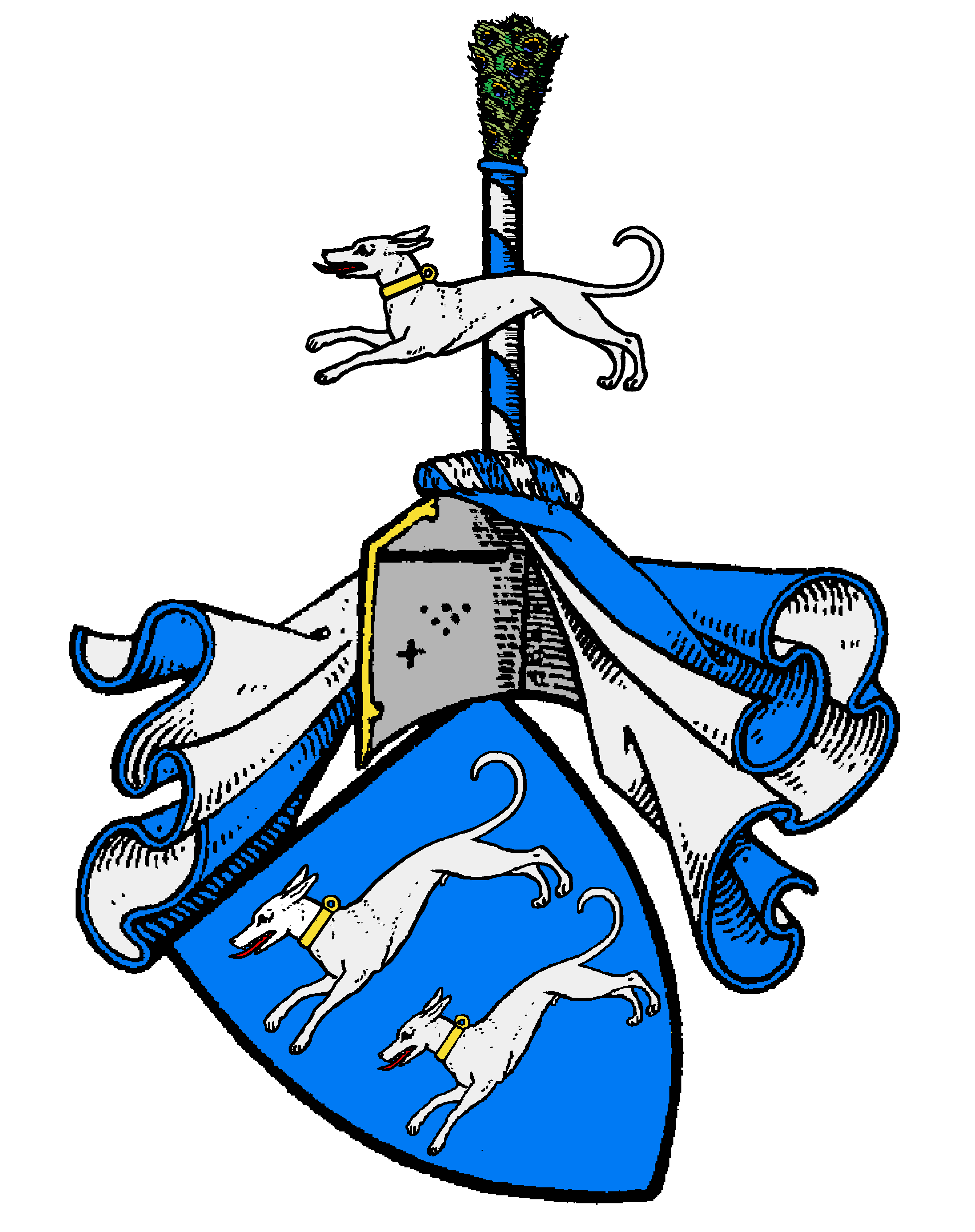 Stammwappen der von Ilten